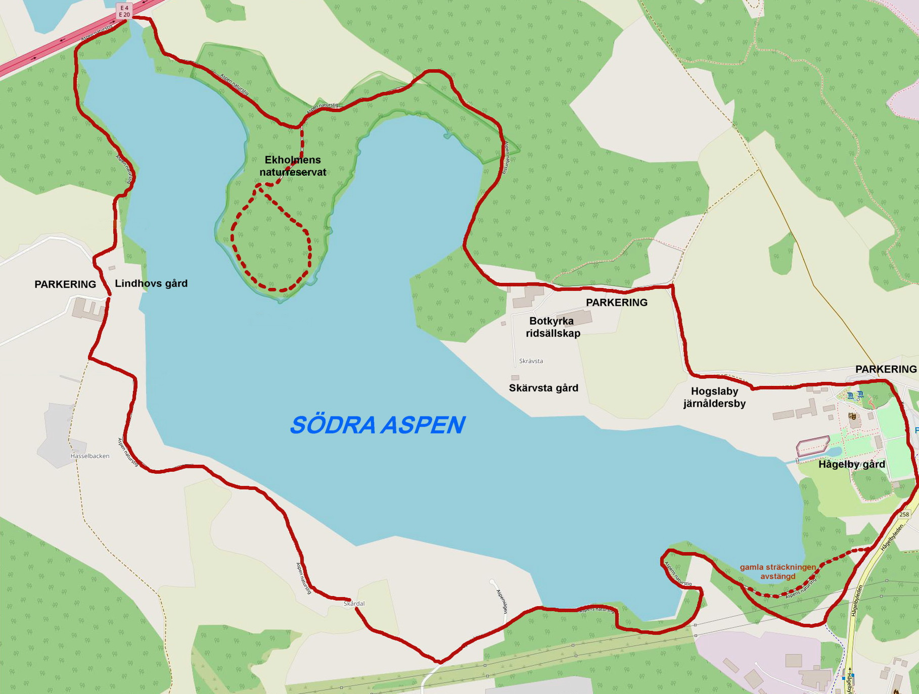 Aspens naturstig Bakgrundskarta: Open Street Map Förklaringar: Holger Ellgaard